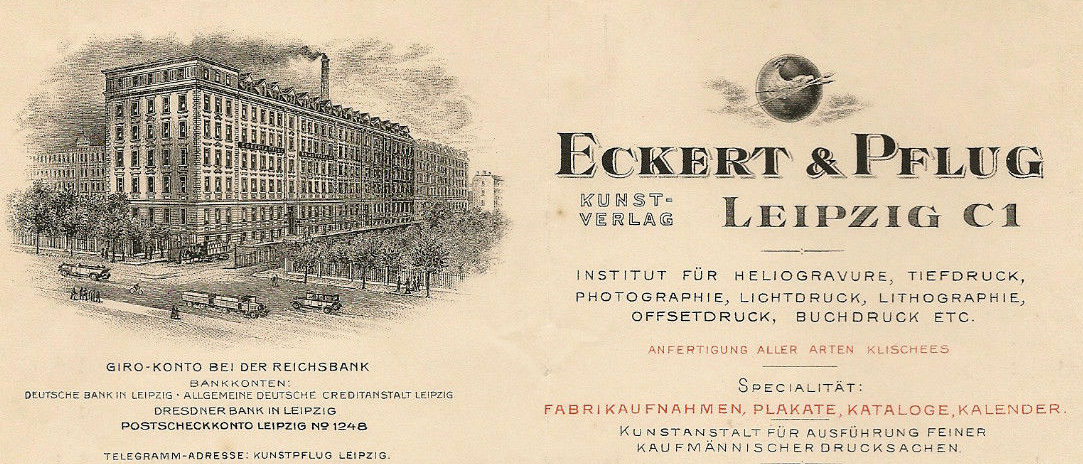 Briefkopf des Kunstverlags Eckert & Pflug, Institut für Helogravure, Tiefdruck, Photographie, Lichtdruck, Offsetdruck, Buchdruck usw. Neben der Anfertigung von Klischees aller Art druckte das Unternehmen Fabrikaufnahmen, Plakate, Kataloge und Kalender und warb als „Kunstanstalt für Ausführung feiner Kaufmännischer Drucksachen“ ...